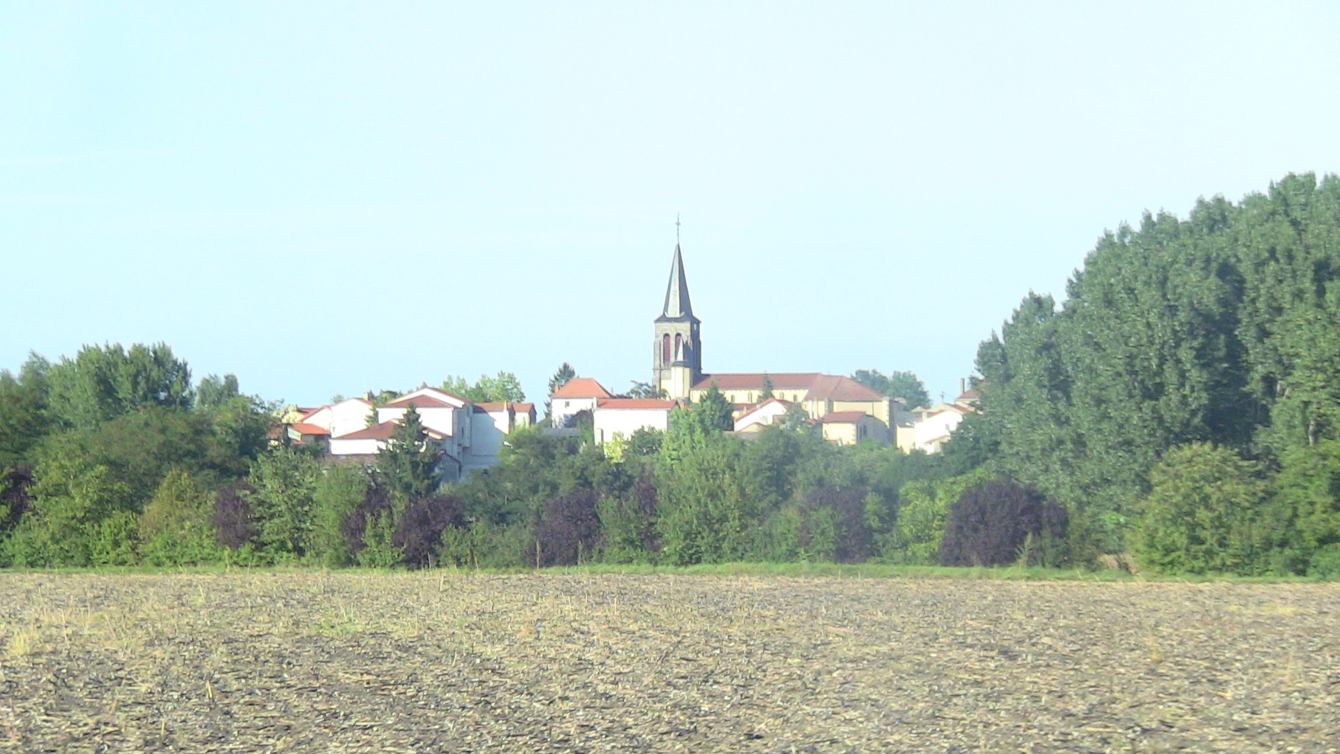 ceci est une vue globale des Martres sur Morge. on aperçoit le clocher du village au loin.